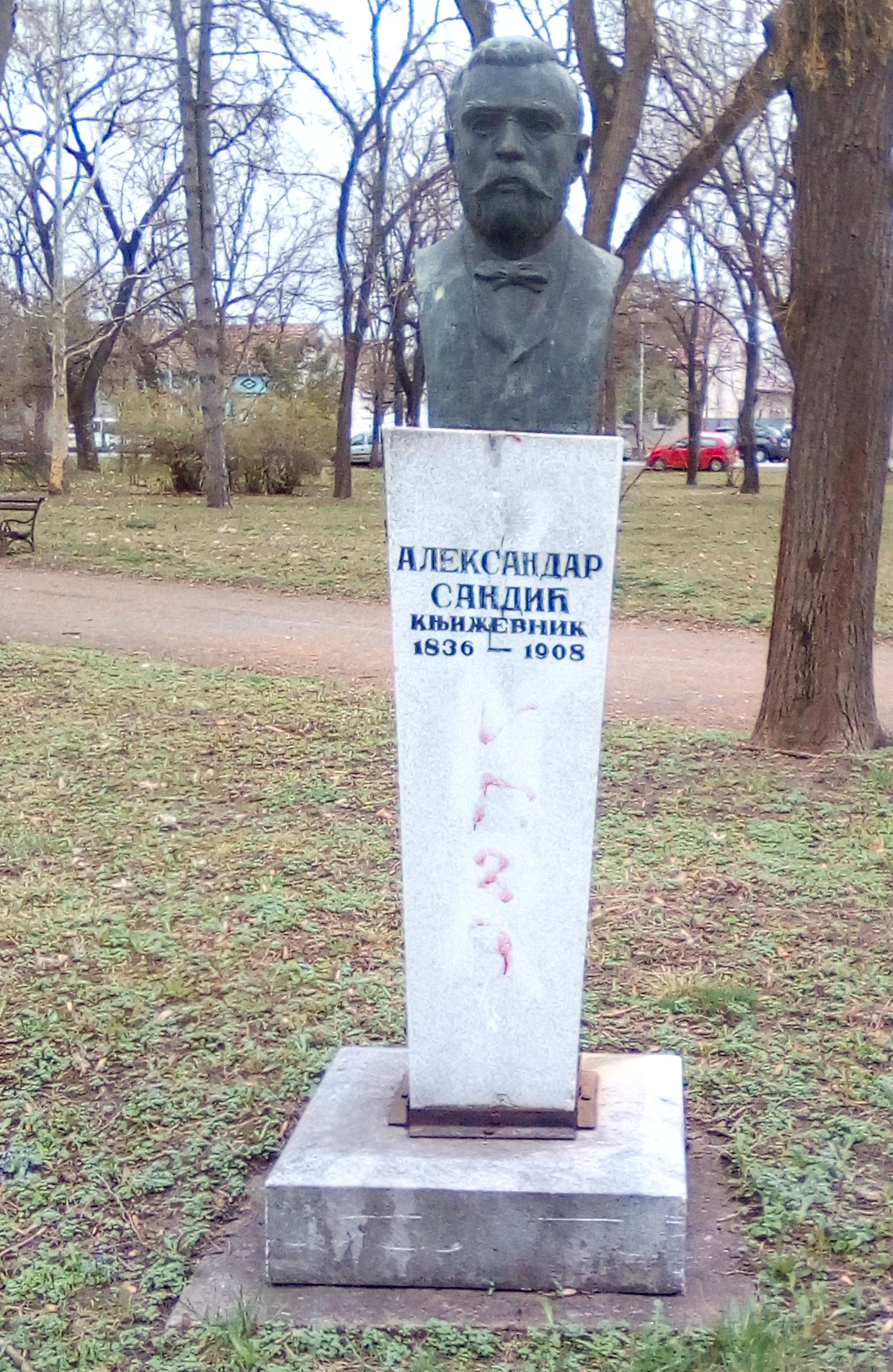 Спомен-биста Александру Сандићу у Карађорђевом парку у Зрењанину